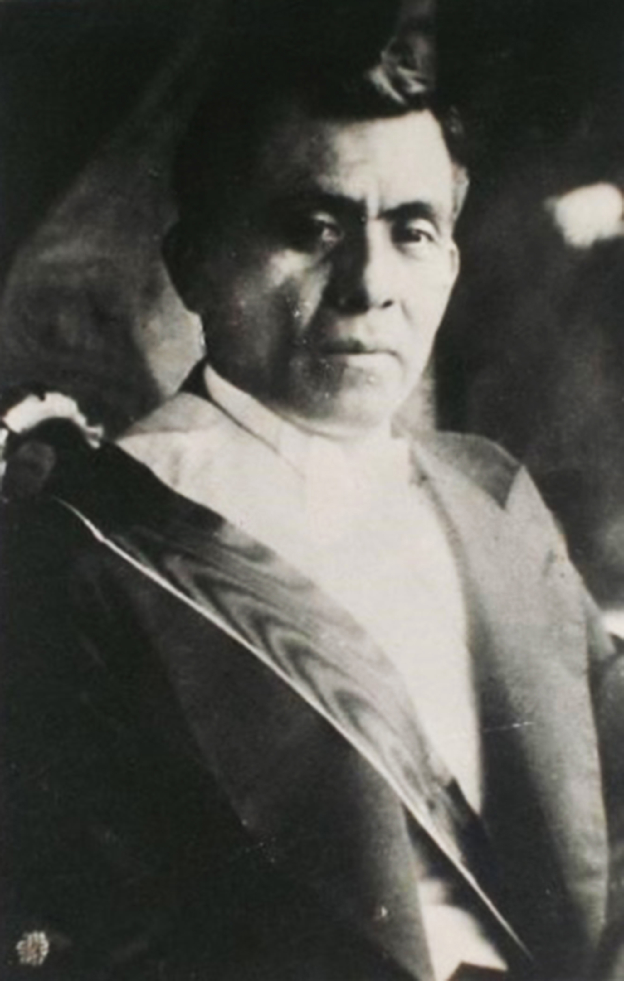 Foto de Presidente Sanchez Cerro tomado en 1933